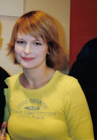 Dominika Ostałowska (ur. 18 lutego 1971 w Warszawie) - polska aktorka.